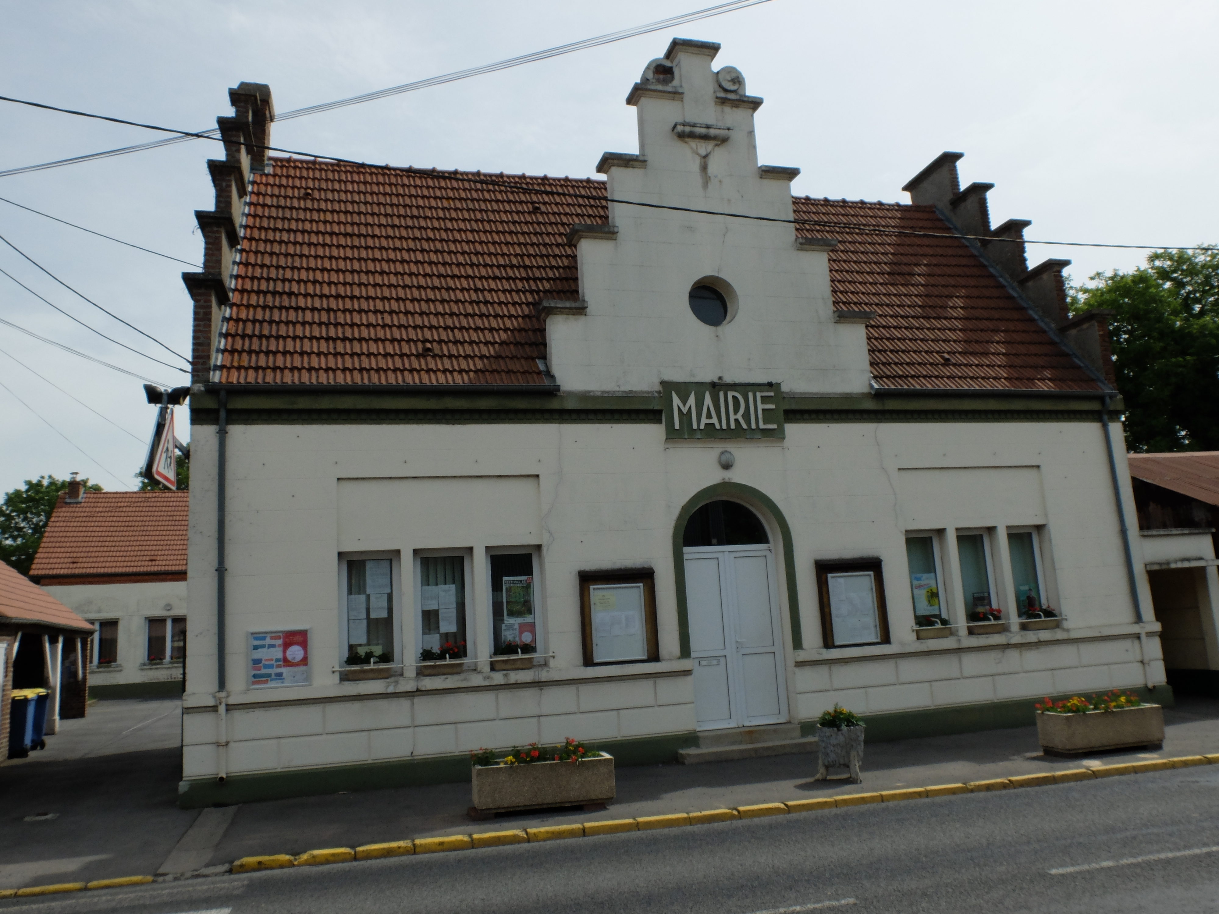 Vue de la mairie d'Hénin-sur-Cojeul.